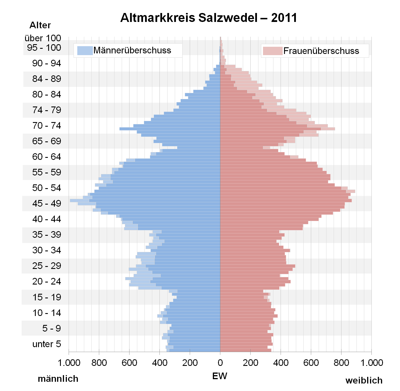 Bevölkerungspyramide des Altmarkkreises Salzwedel nach Zensus 2011.